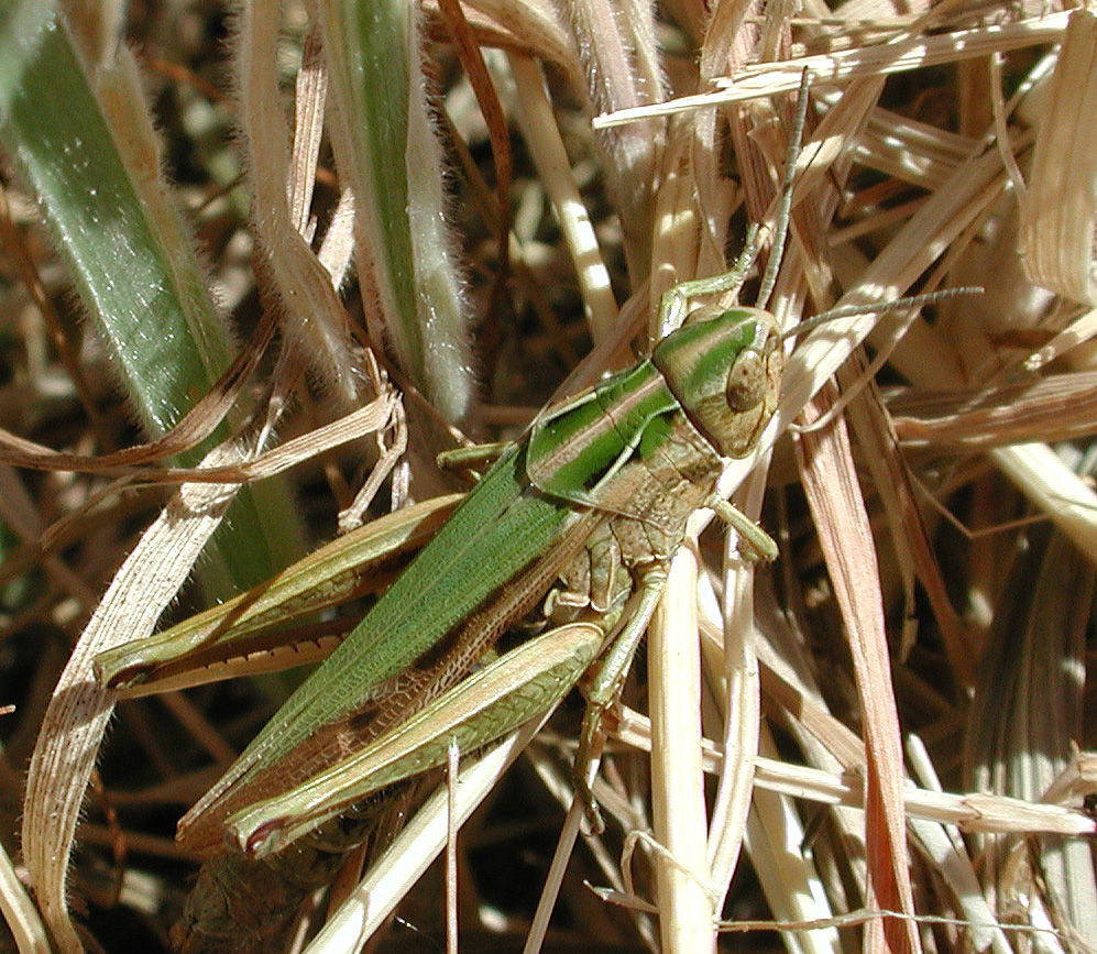 Omocestus viridulus, female, Bunter Grashüpfer, NSG Kirchwerder Wiesen, Elbmarsch bei Hamburg, Germany